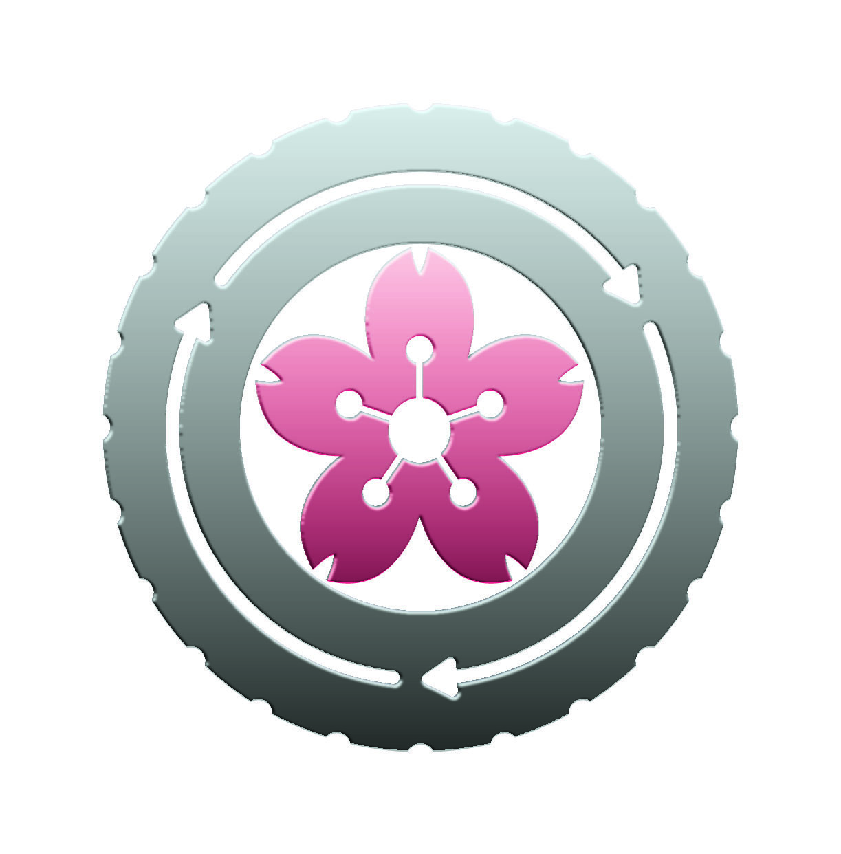 株式会社グリーンエレメンツのコーポレートマーク＝タイヤリサイクルと桜